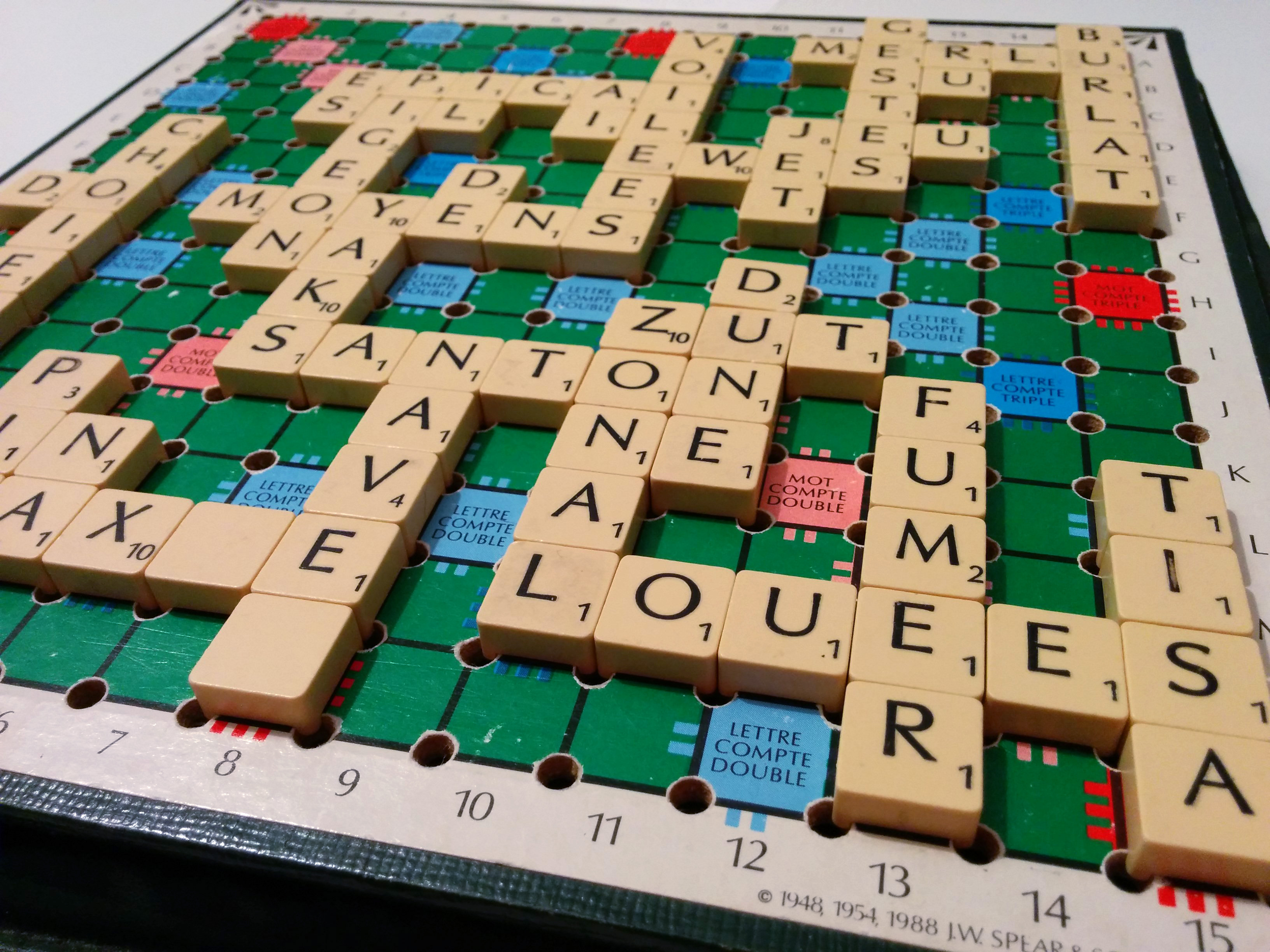 Une partie de Scrabble.